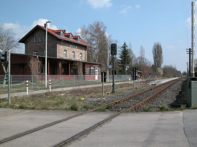 Bahnhof Langlau (Pfofeld)